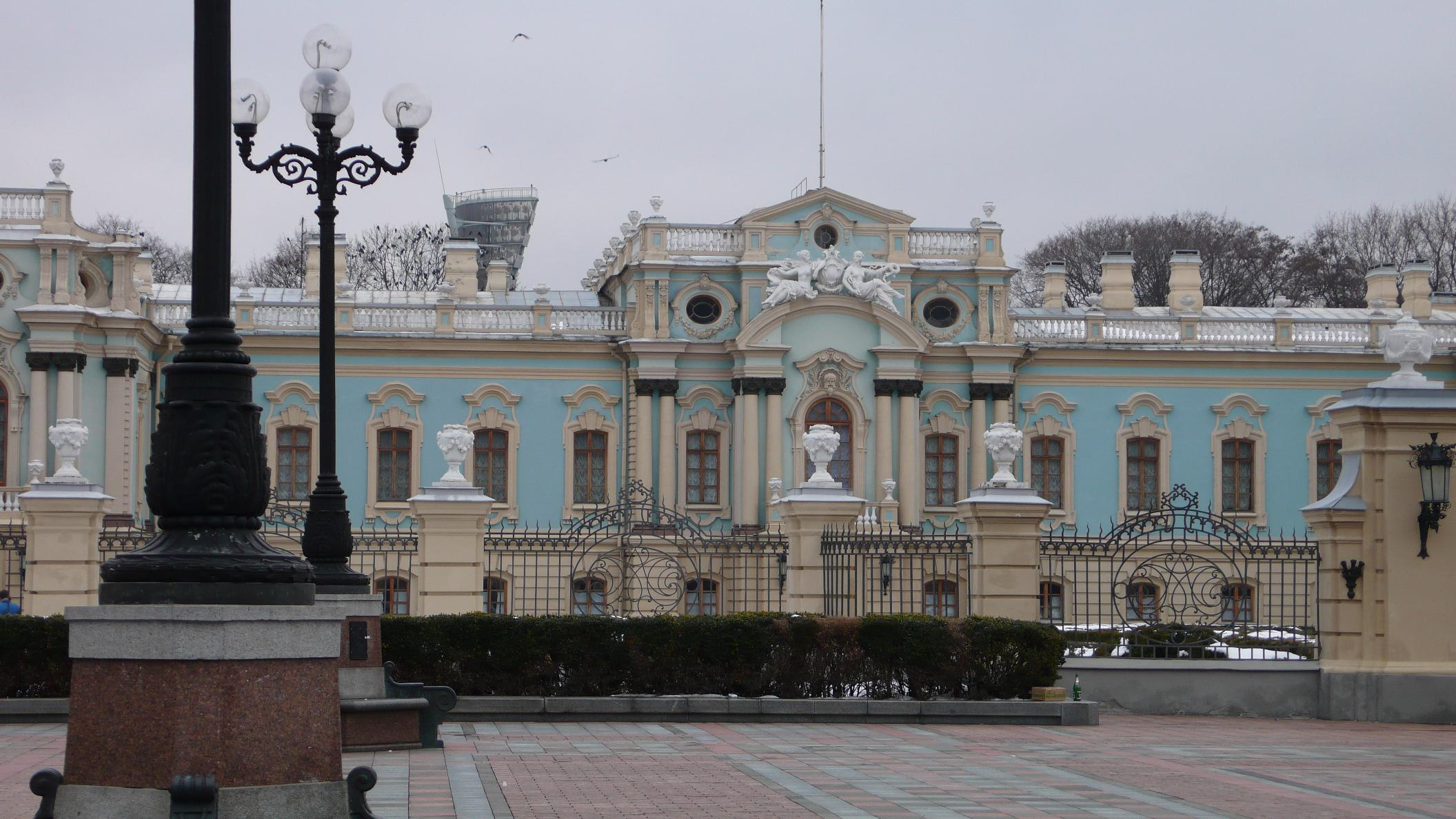 Мариинский дворец в Киеве